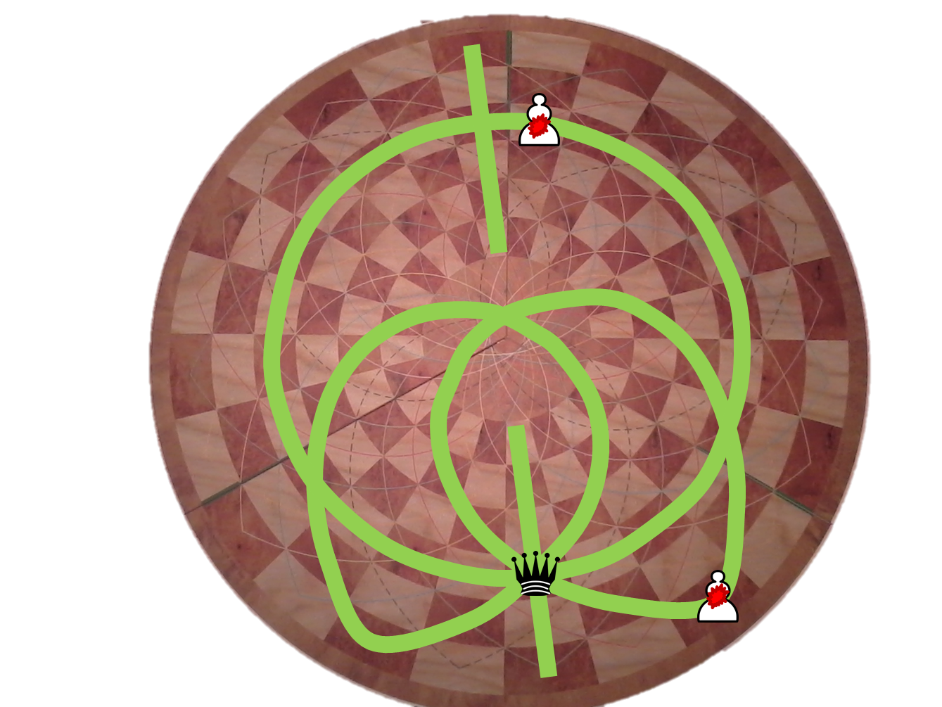 תזוזת המלכה בשחמט 360